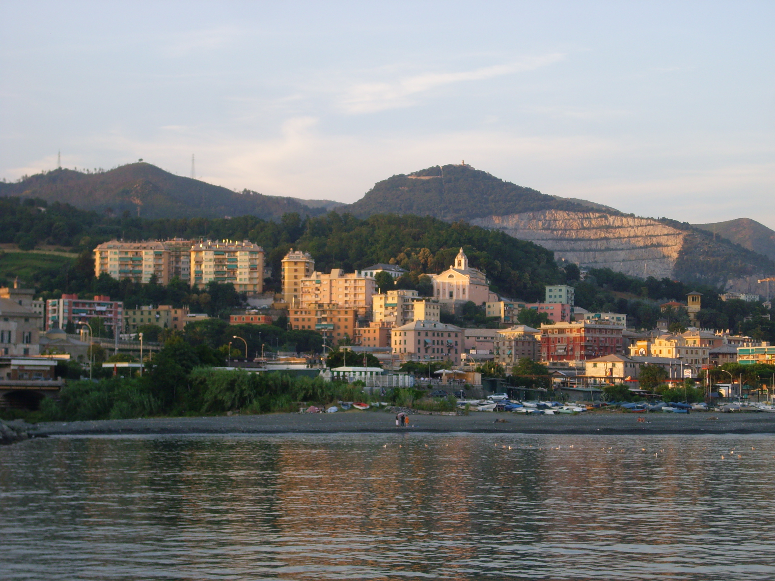 La zona di confine tra Multedo e Pegli, fotografata dal mare.